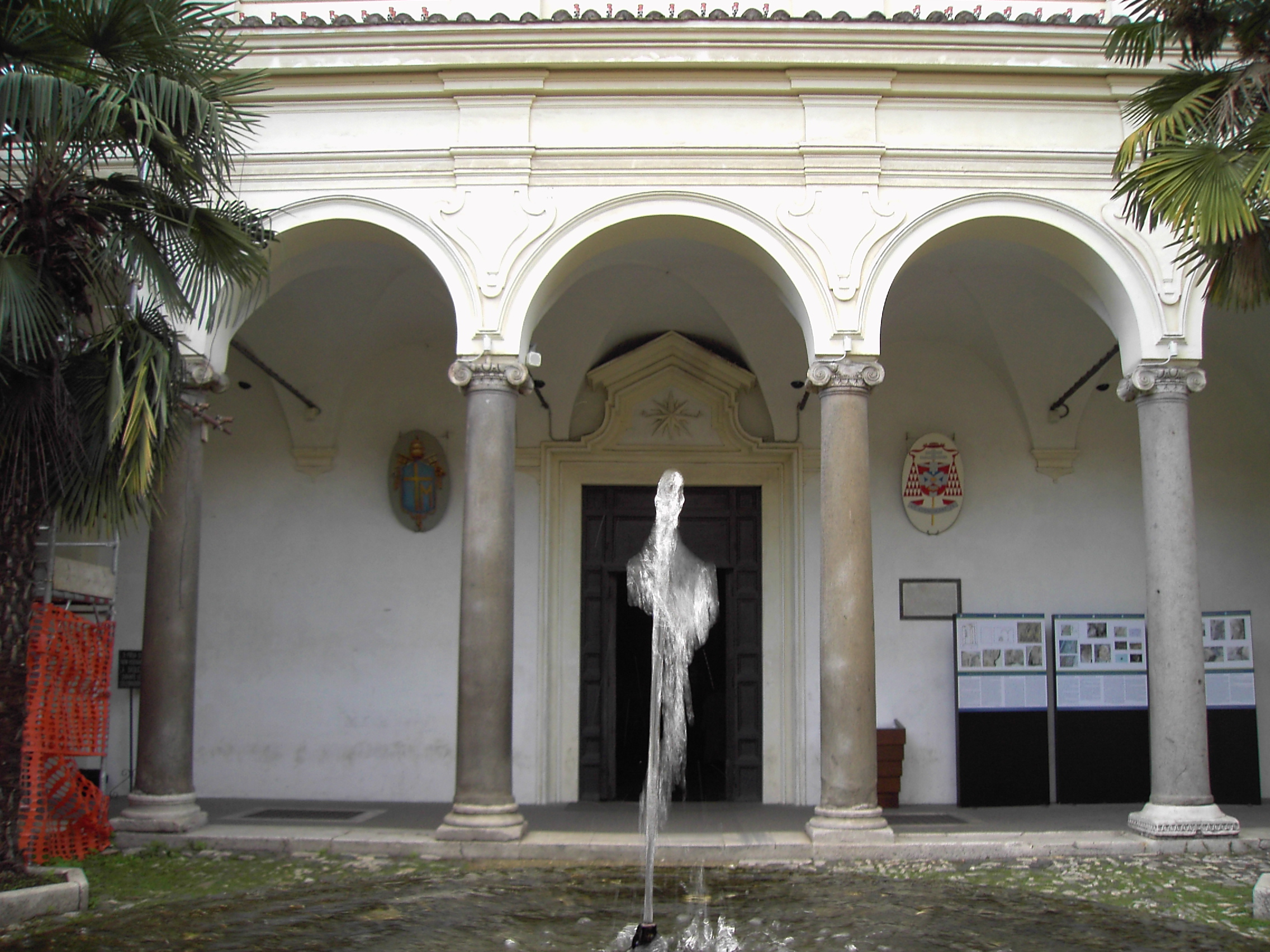 Roma , Basilica di san Clemente: ingresso nel chiostro